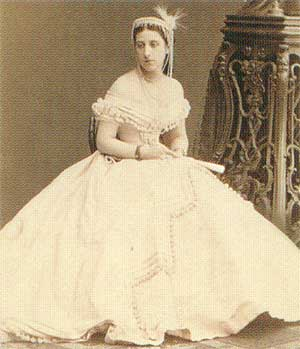 Мария Элимовна Мещерская в бальном платье